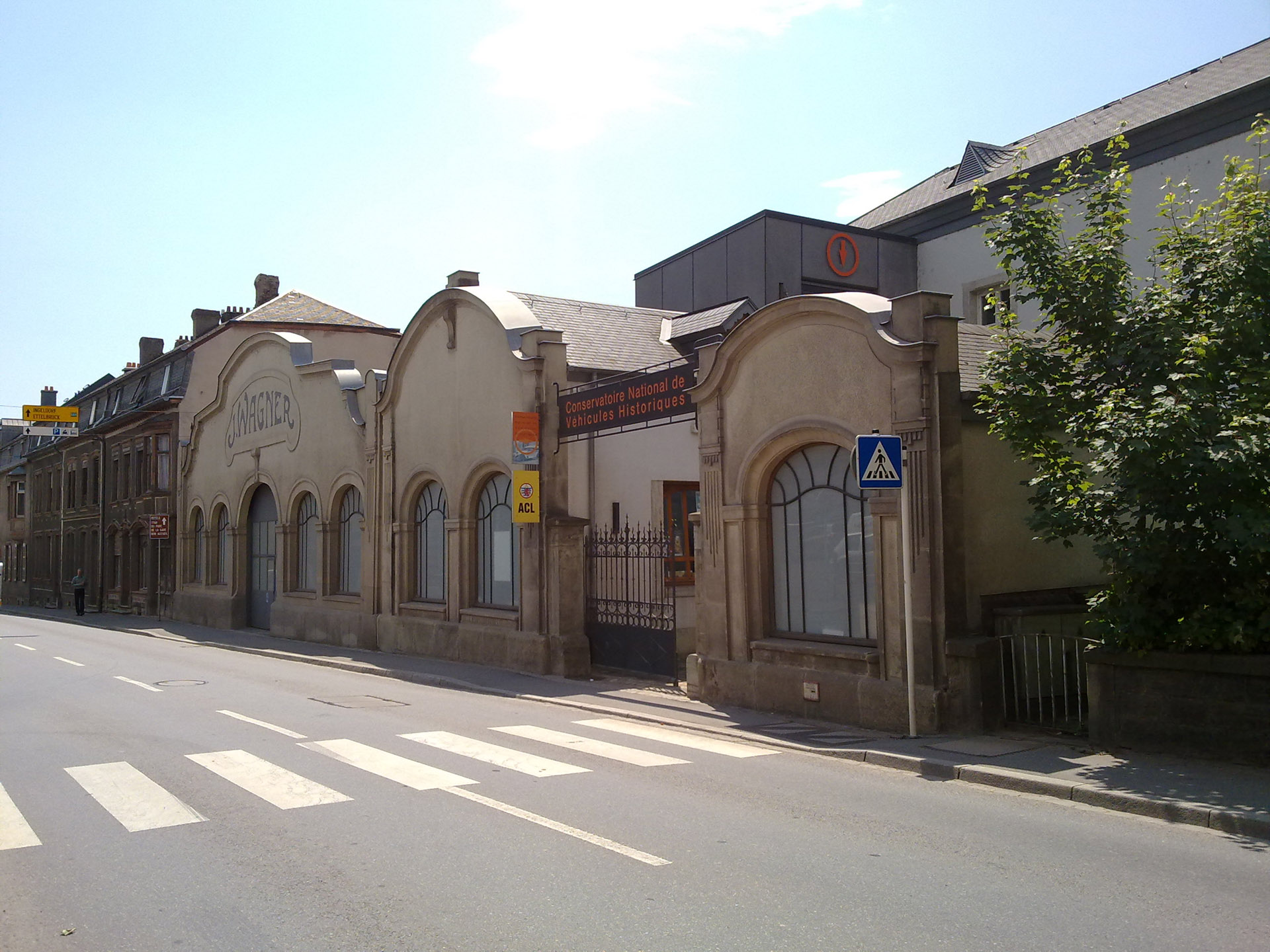 Den Nationalconservatoire vun historesche Gefierer zu Dikrech.